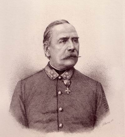 sconosciuto scanner da fotografia Generale Montluisant 1870 ca. pubblico dominio